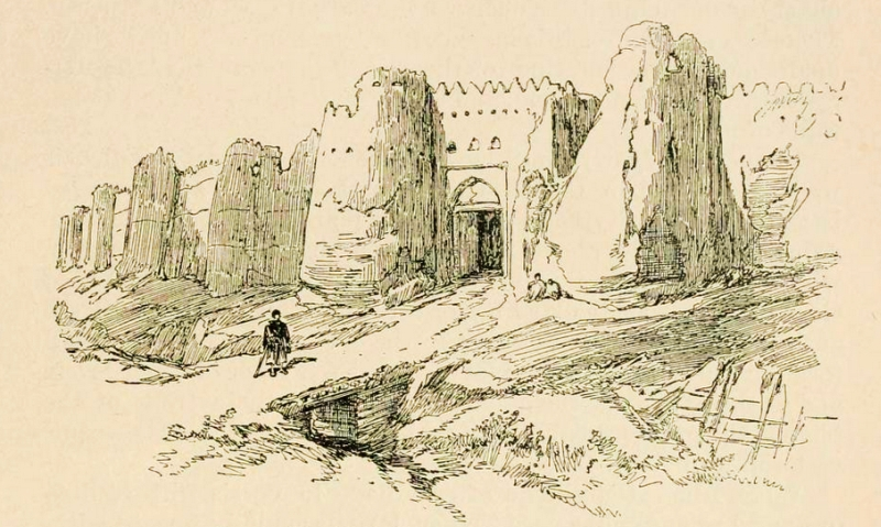 Dibujo de las Murallas de barro de la ciudad de Nishapur, en Jorasán, Irán, s. XIX.